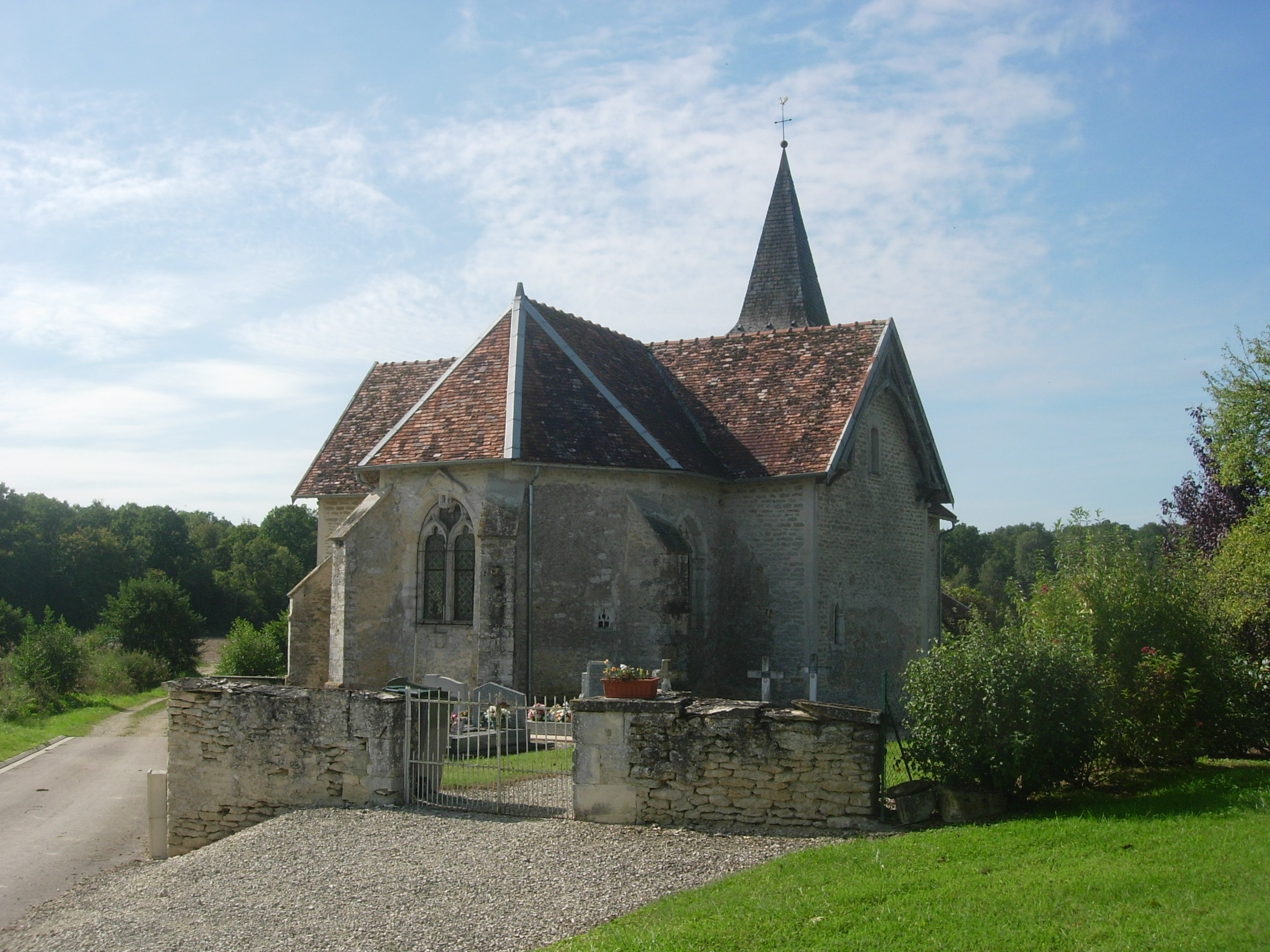 Eglise de La Chaise (Aube)